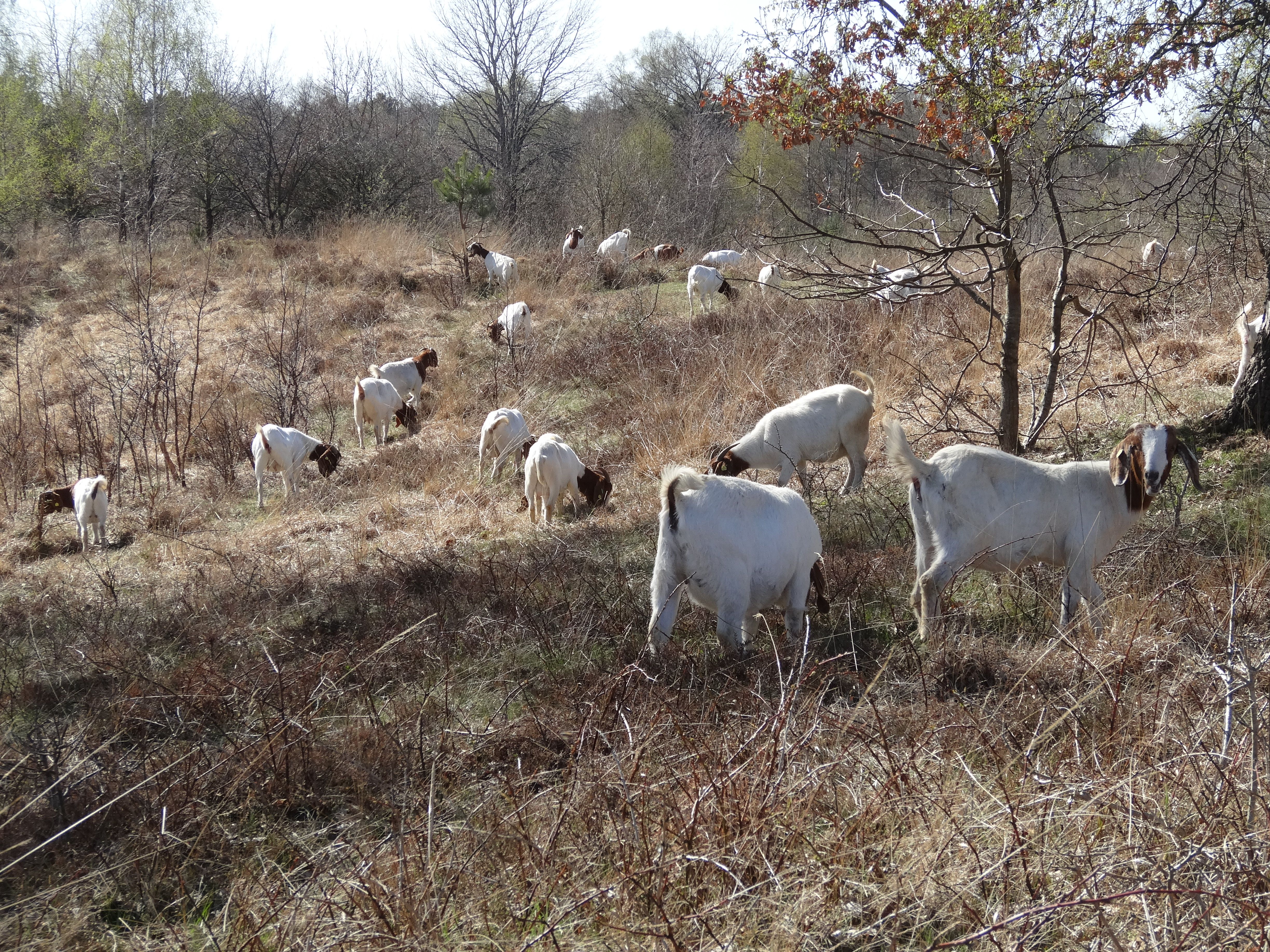 Kremperheide, das ehemalige Übungsgebiet der "Freiher von Fritsch-Kaserne" soll auch von Burenziegen zur Wiederansiedlung des Goldener Scheckenfalters von Vegetation freigehalten werden. [1], [2]